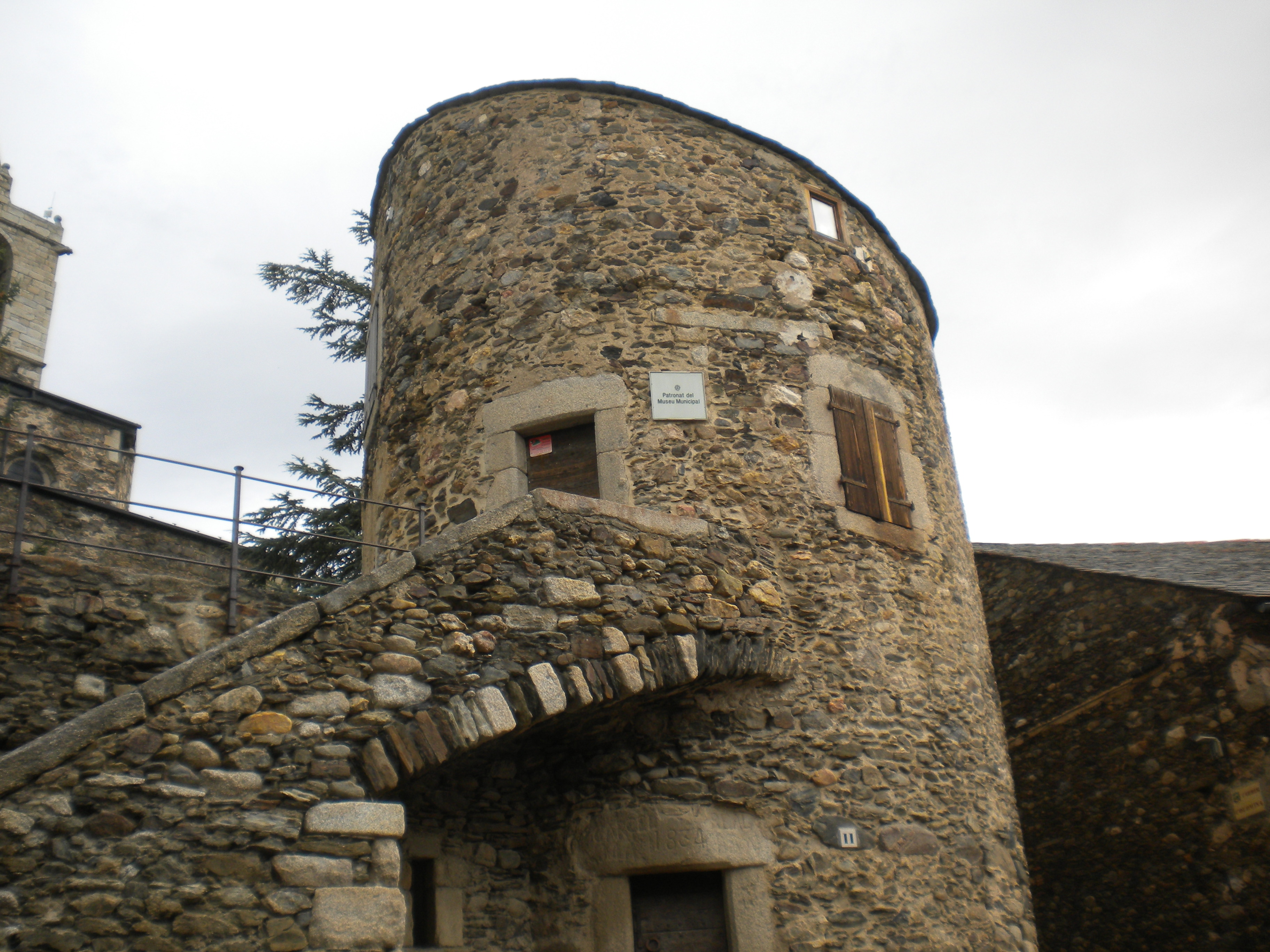 Antiga torre de defensa de Bernat de So, actualment seu del Patronat del Museu municipal, a Llívia, Baixa Cerdanya.